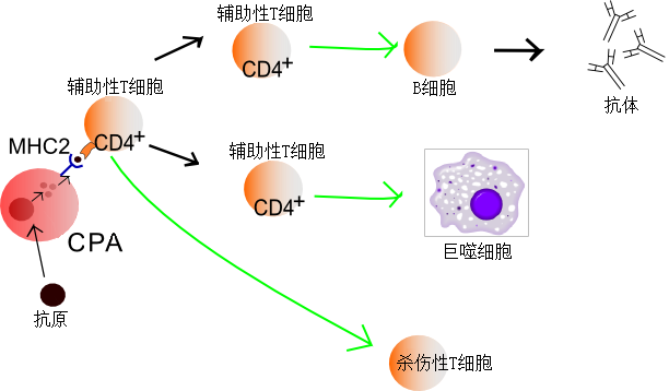 辅助性T细胞功能